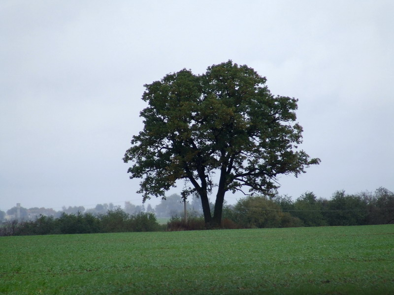 Oak. Dasiūnai, Kaunas district, Lithuania.